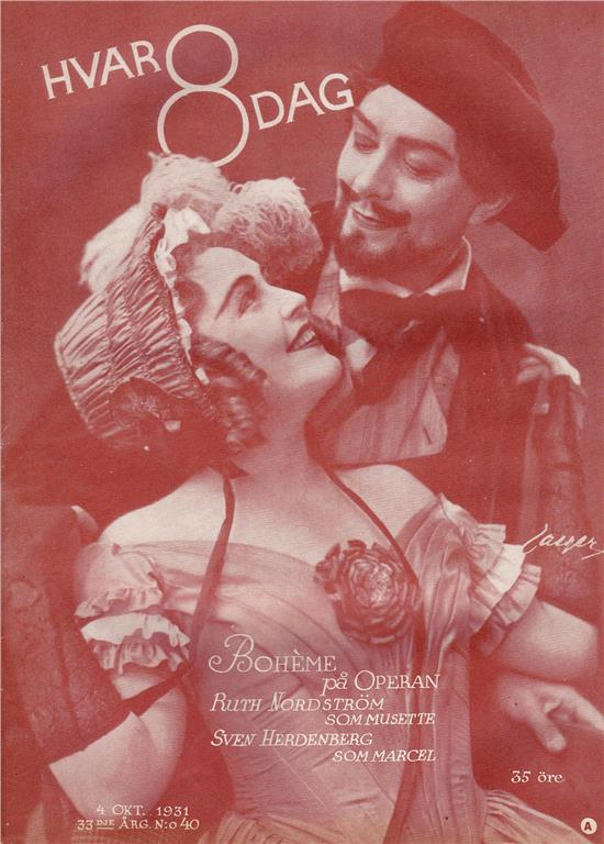 Swedish opera singers Ruth Nordström and Sven Herdenberg